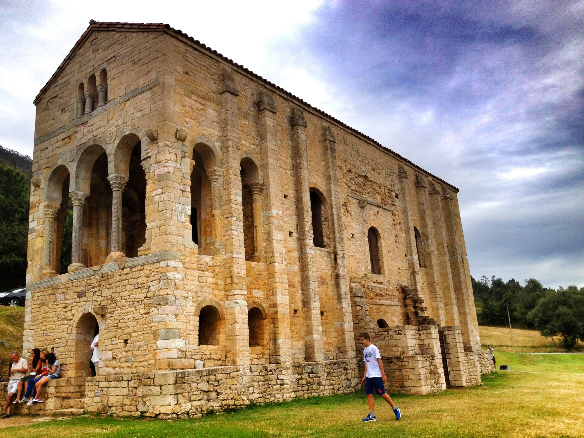 Iglesia de Santa María del Naranco